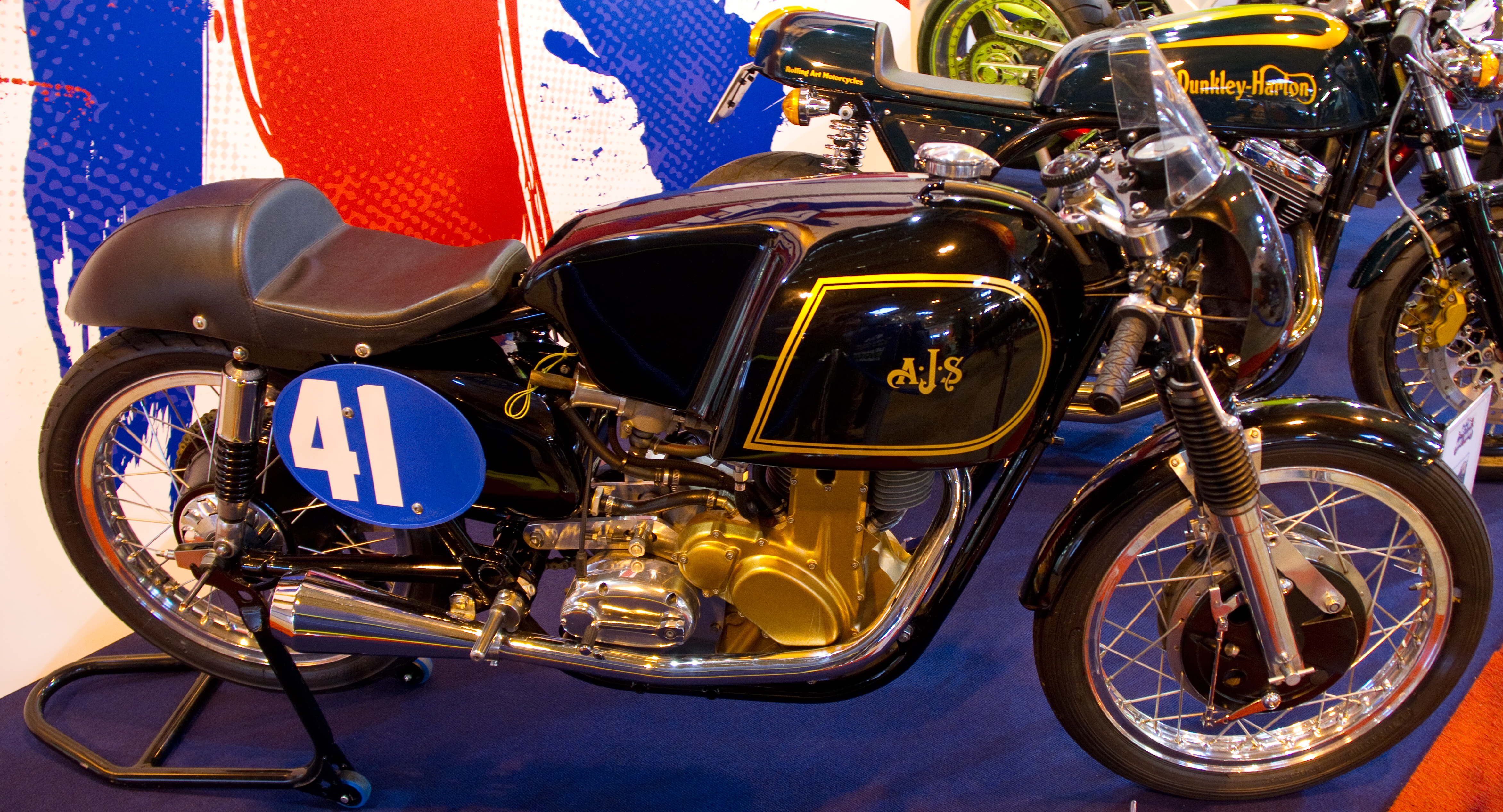 1962 AJS 7R